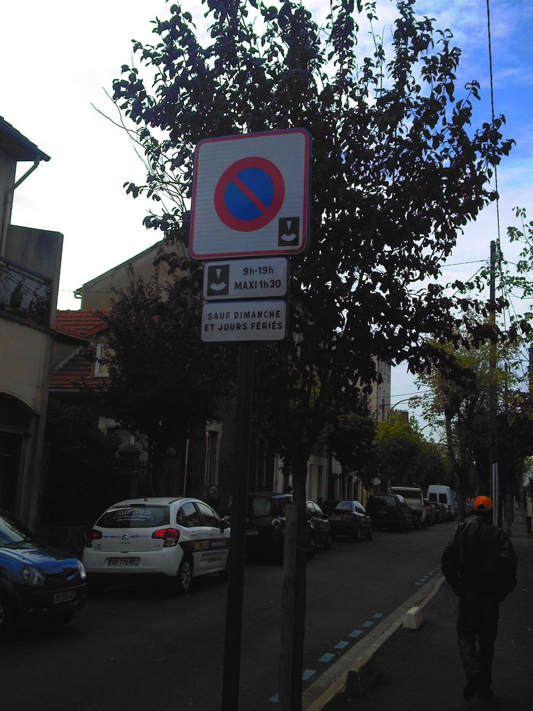 Panneau indiquant une rue en zone bleue à Drancy